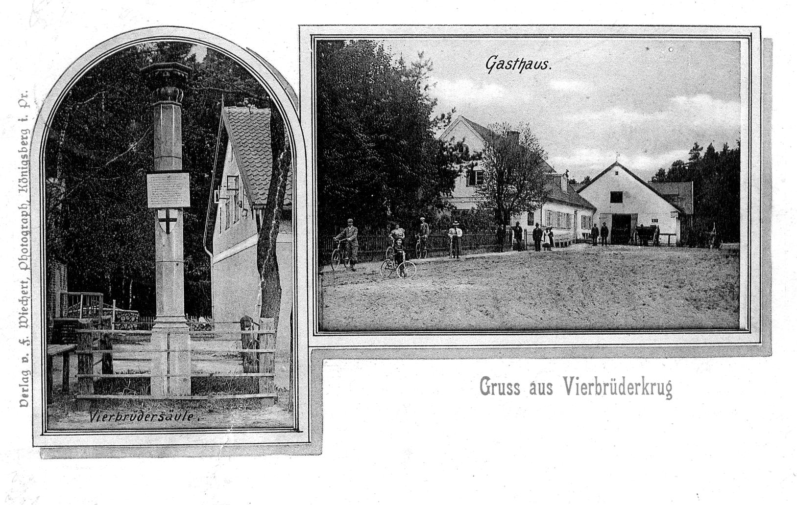 Fotografie/Postkarte der Vierbrüdersäule und des Vierbrüderkrugs in Metgethen bei Königsberg i. Pr.